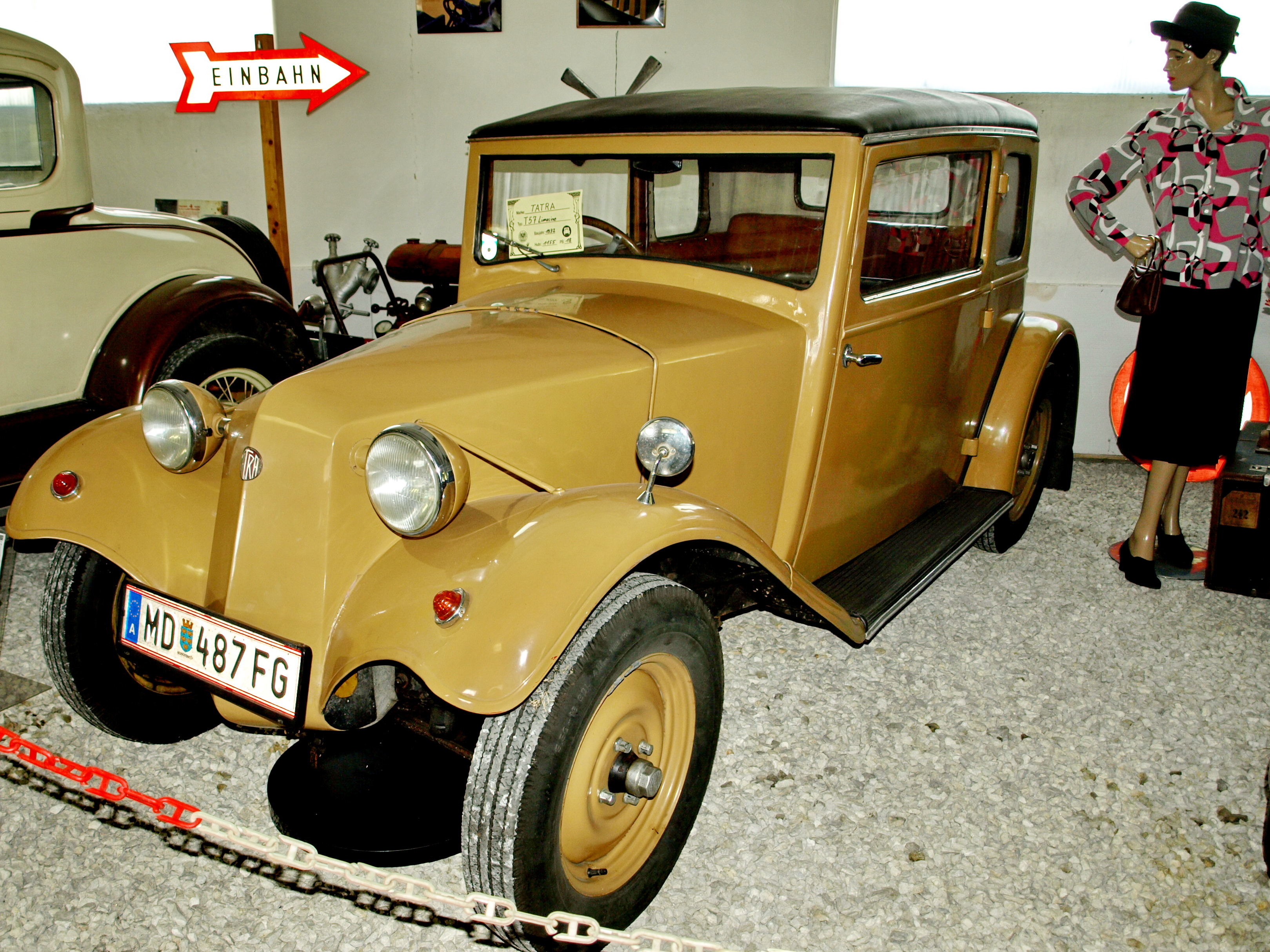 Tatra Museum Steinabrückl Niederösterreich 2011